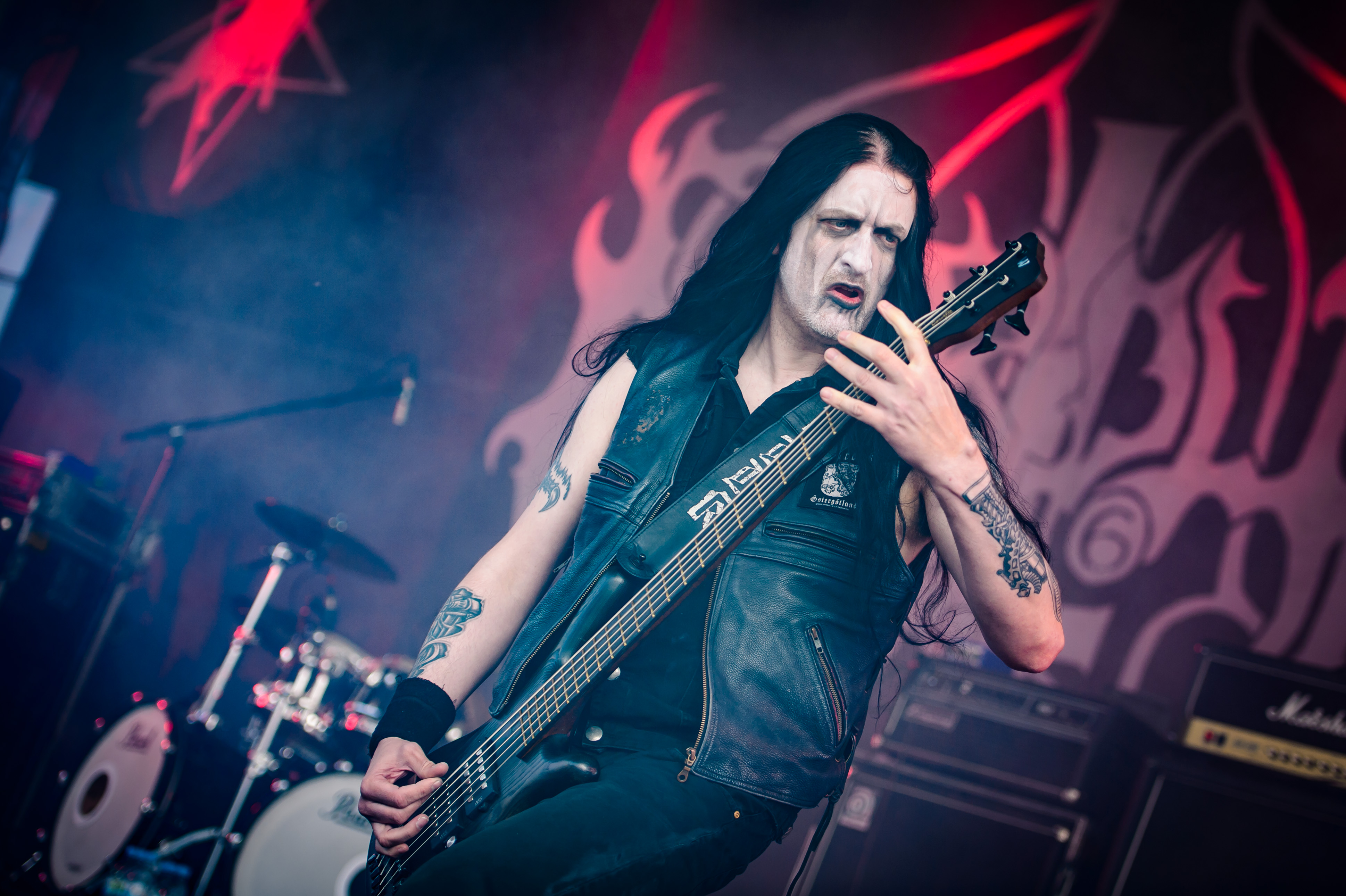 'Rock Hard Festival 2018; Amphitheater Gelsenkirchen': 'Marduk'